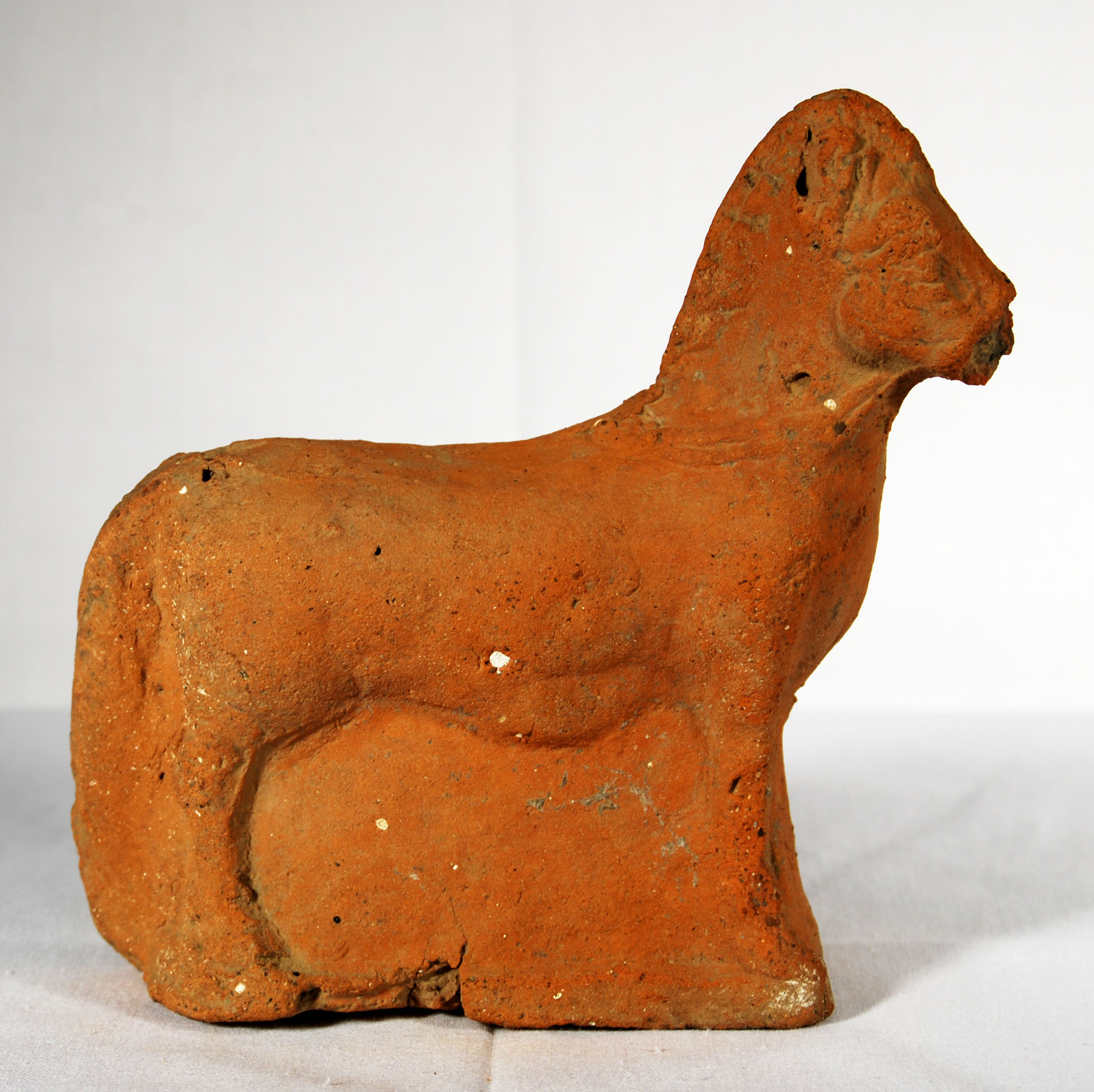 Imatge lateral d’un exvot fet de terracota que representa un cavall, vist de costat i buidat en la mateixa argila. Procedent de Calvi (Campania). Època hel·lenística del segle IV-II aC.